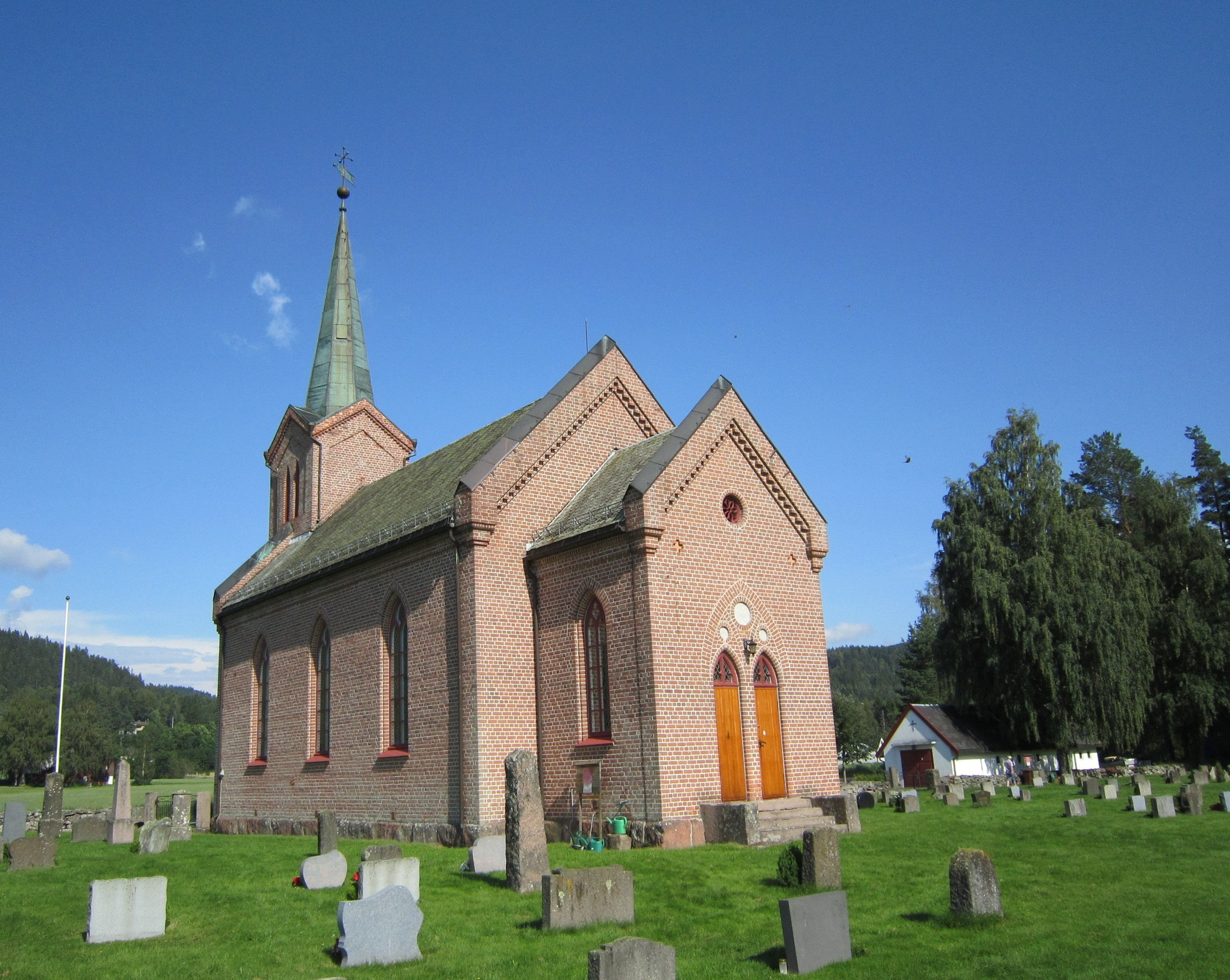 Tuft kirke i Ytre Sandsvær